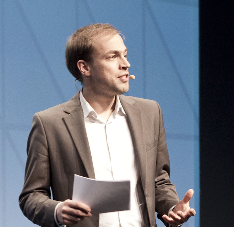 Sebastian Matthes, Wirtschaftswoche